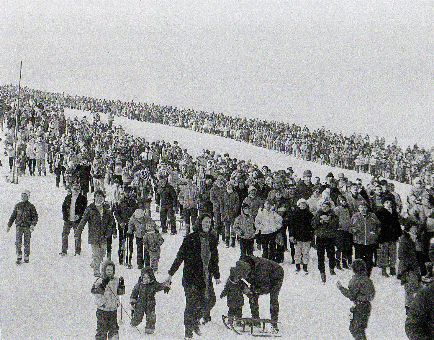 Skifasching - 80er Jahre - Rodigt Schlucht Nossen - Zuschauerrekord 10.000